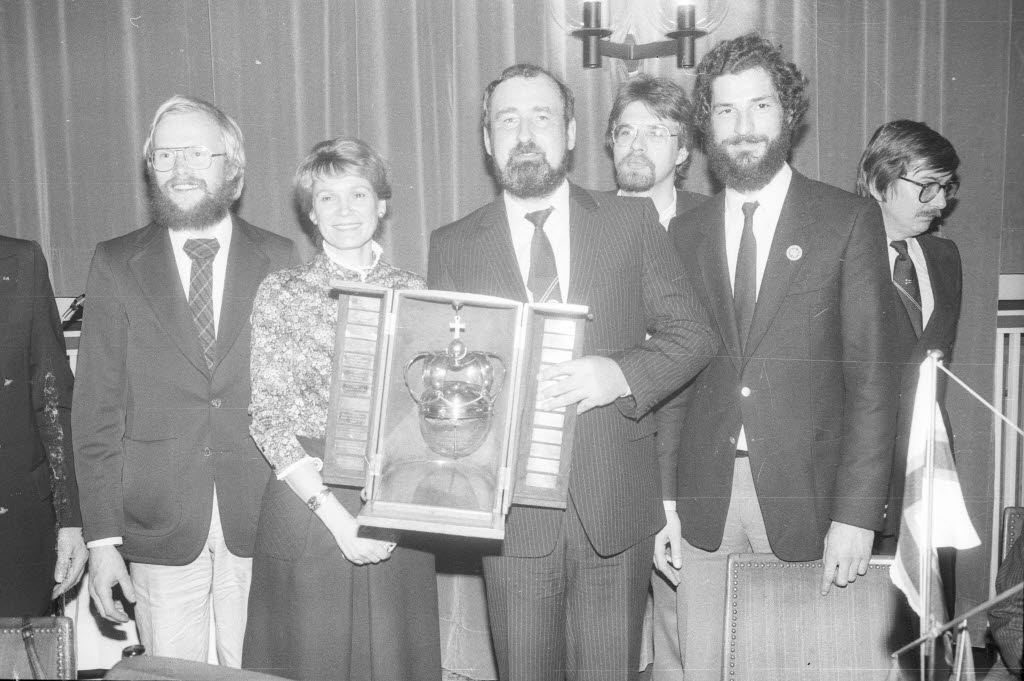 Kieler Yacht-Club (KYC). Im Bild u.a. die Preisträger Heide Wilts-Massar (2.v.l.) und Erich Wilts (3.v.l.).